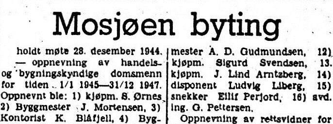 Avisreferat om saker og vedtak i Mosjøen byting.